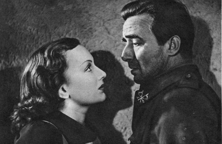 Mireille Balin e Fosco Giachetti in una foto di scena de L'assedio dell'Alcazar, regia di Augusto Genina (1940).